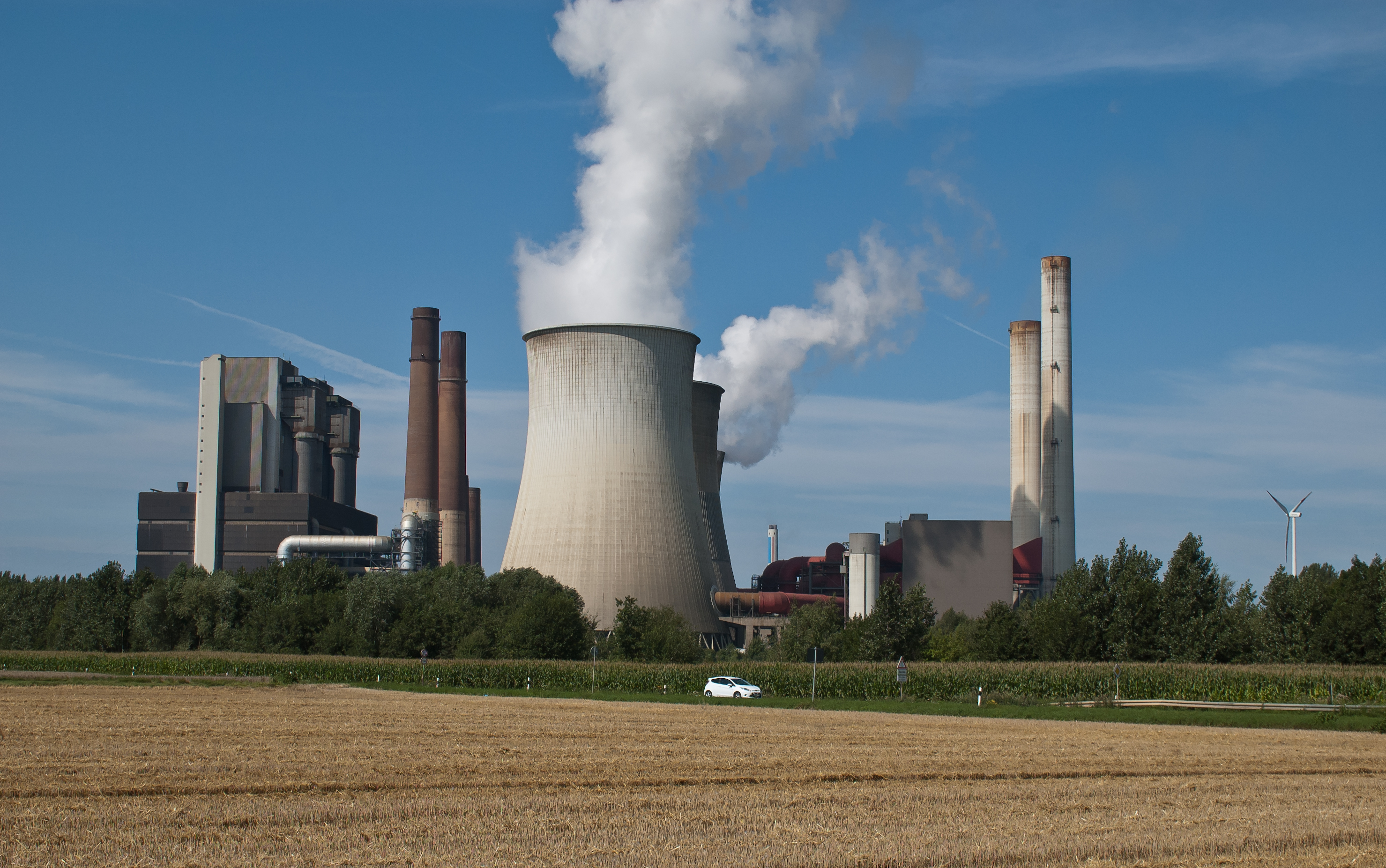 Das Braunkohlekraftwerk Weisweiler der RWE Power AG